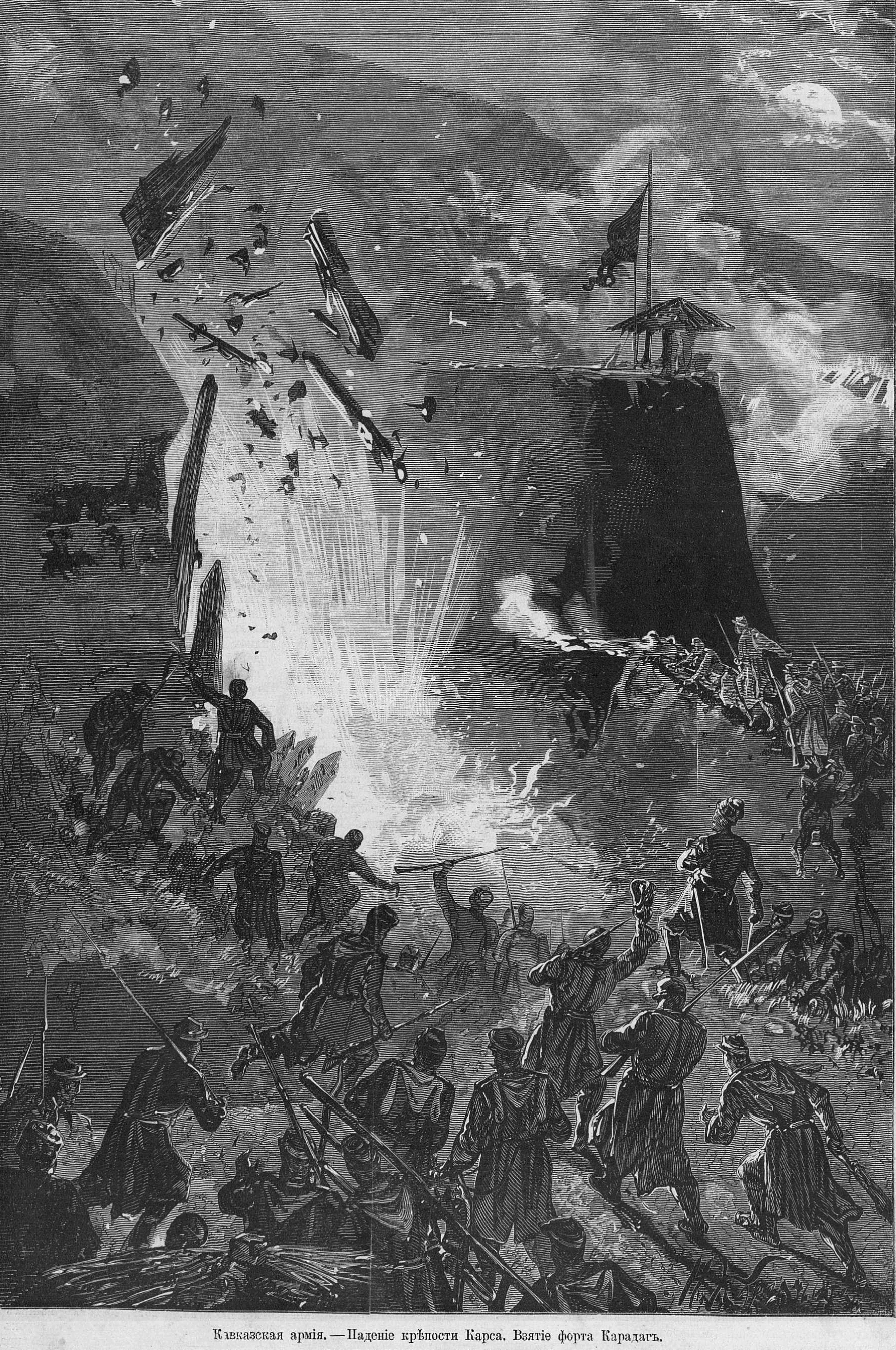 Падение Карса, 1877, рисунок Н. Н. Каразина